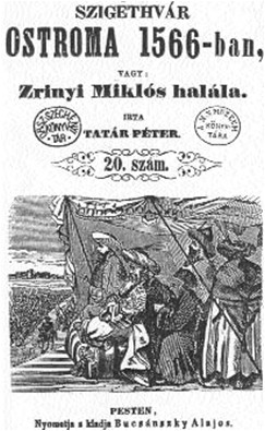 Szigethvár ostroma címlapja